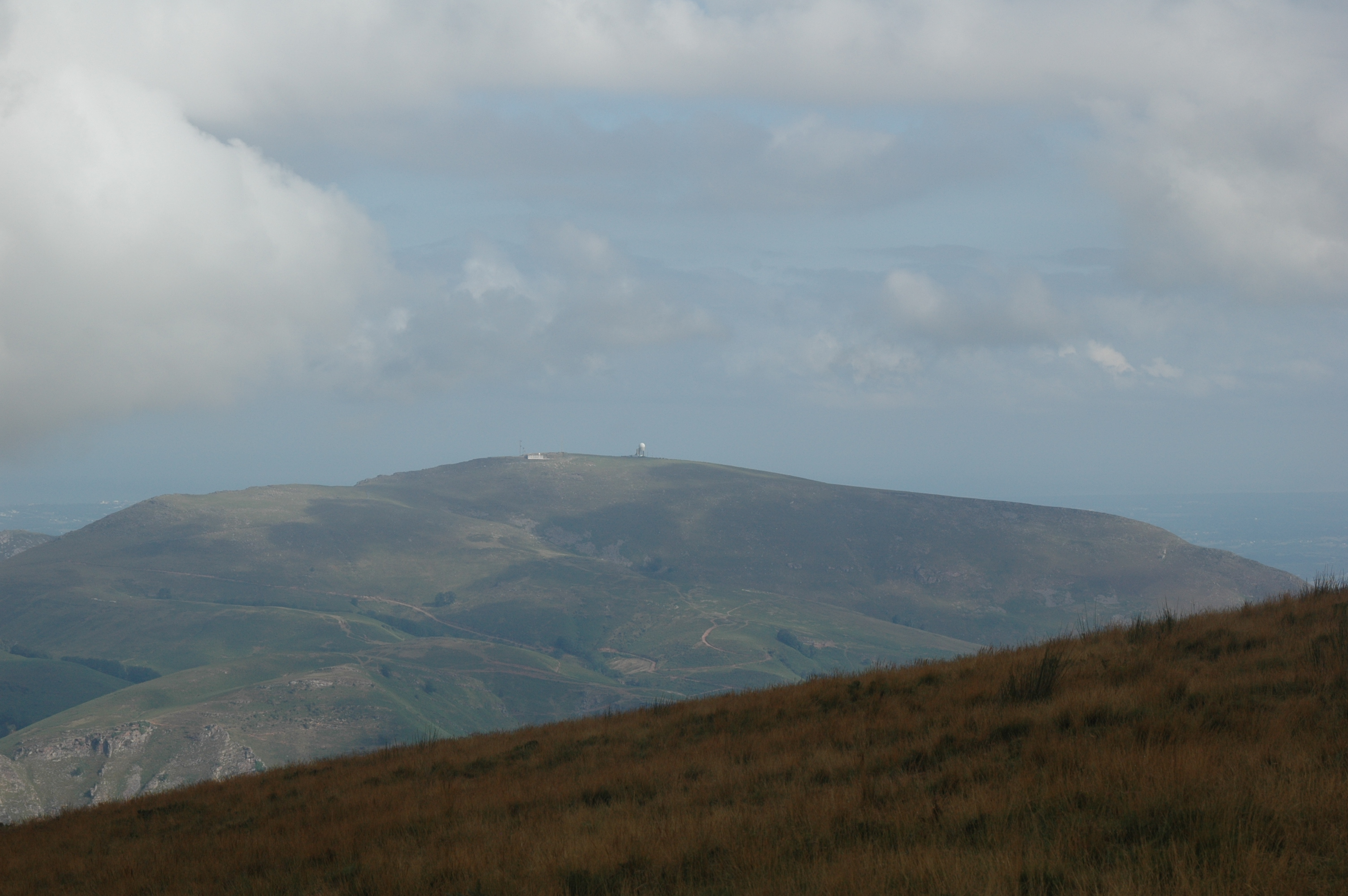 Bidarray, l'Artzamendi vu des crêtes d'Iparla. Photo prise le 11/08/06 par Harrieta171